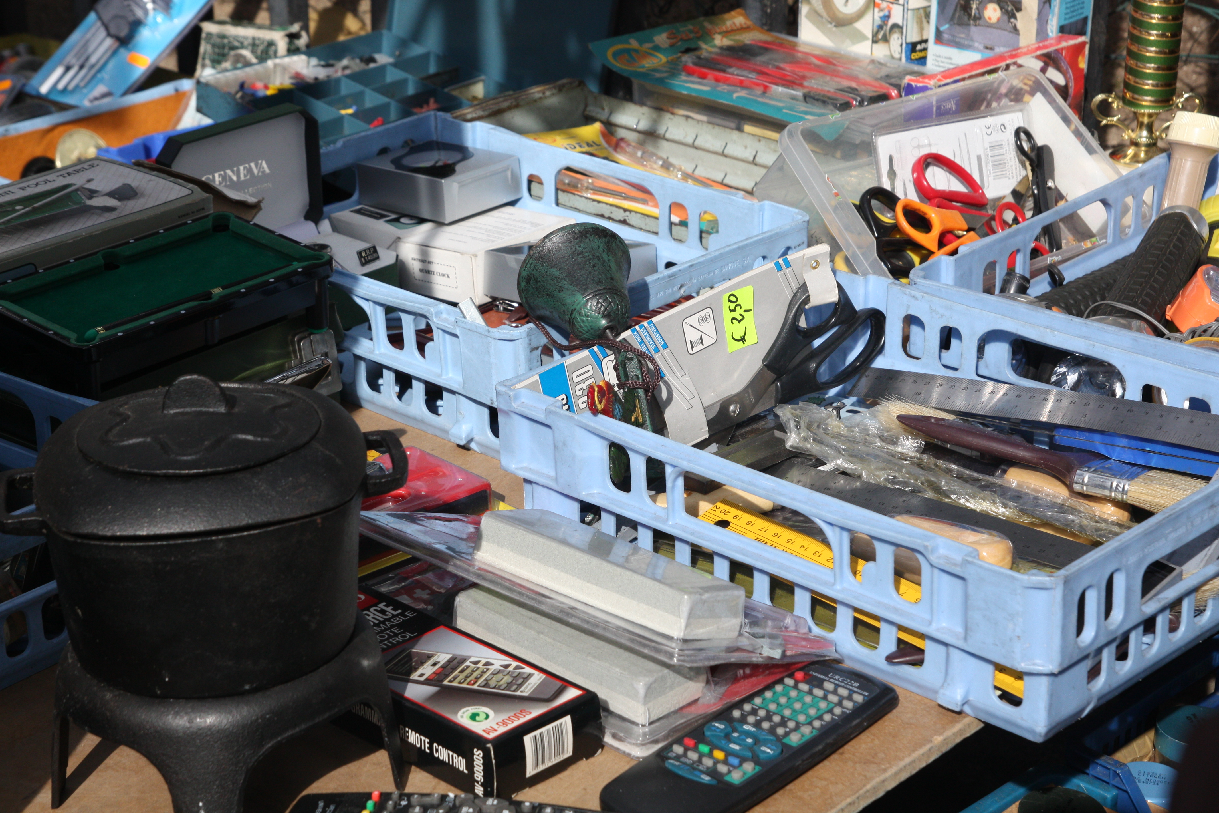 paseo por lavapiés, rastro y pirámides